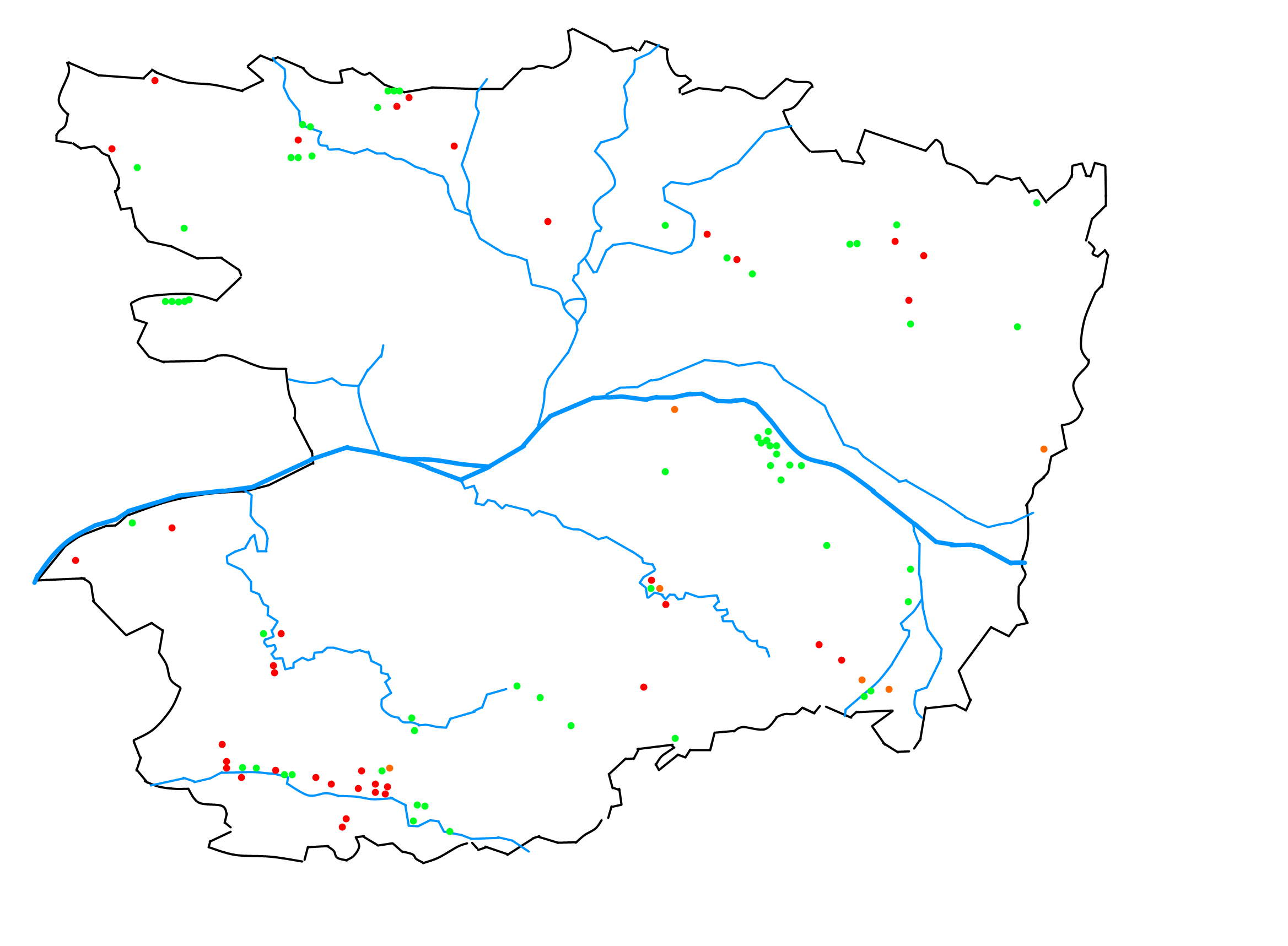 Carte de répartition des menhirs en Maine-et-Loire, selon M. Gruet, 'Mégalithes en Anjou' Vert: menhir debout Orange: menhir couché Rouge: menhir détruit